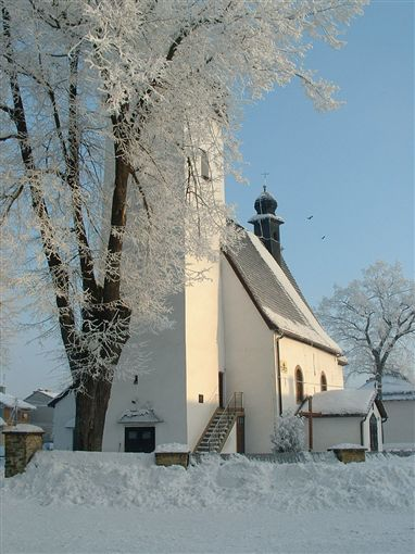 Kościół parafialny we wsi Krempachy. Zdjęcie zostało wykonane na początku roku 2006.